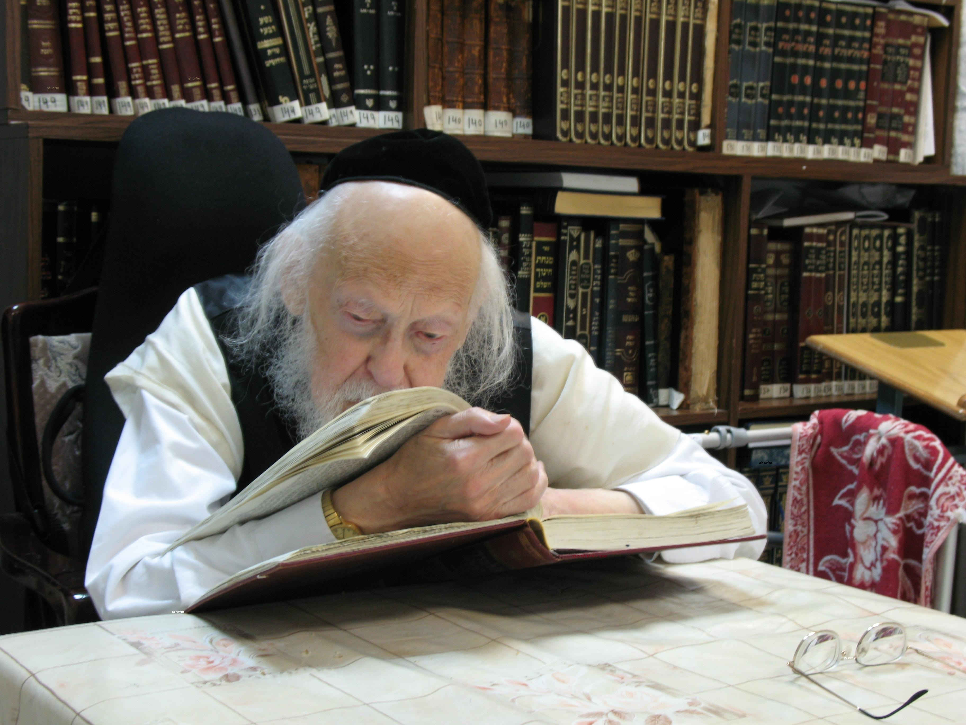 תמונה נדירה של הרב יוסף שלום אלישיב ללא חליפה